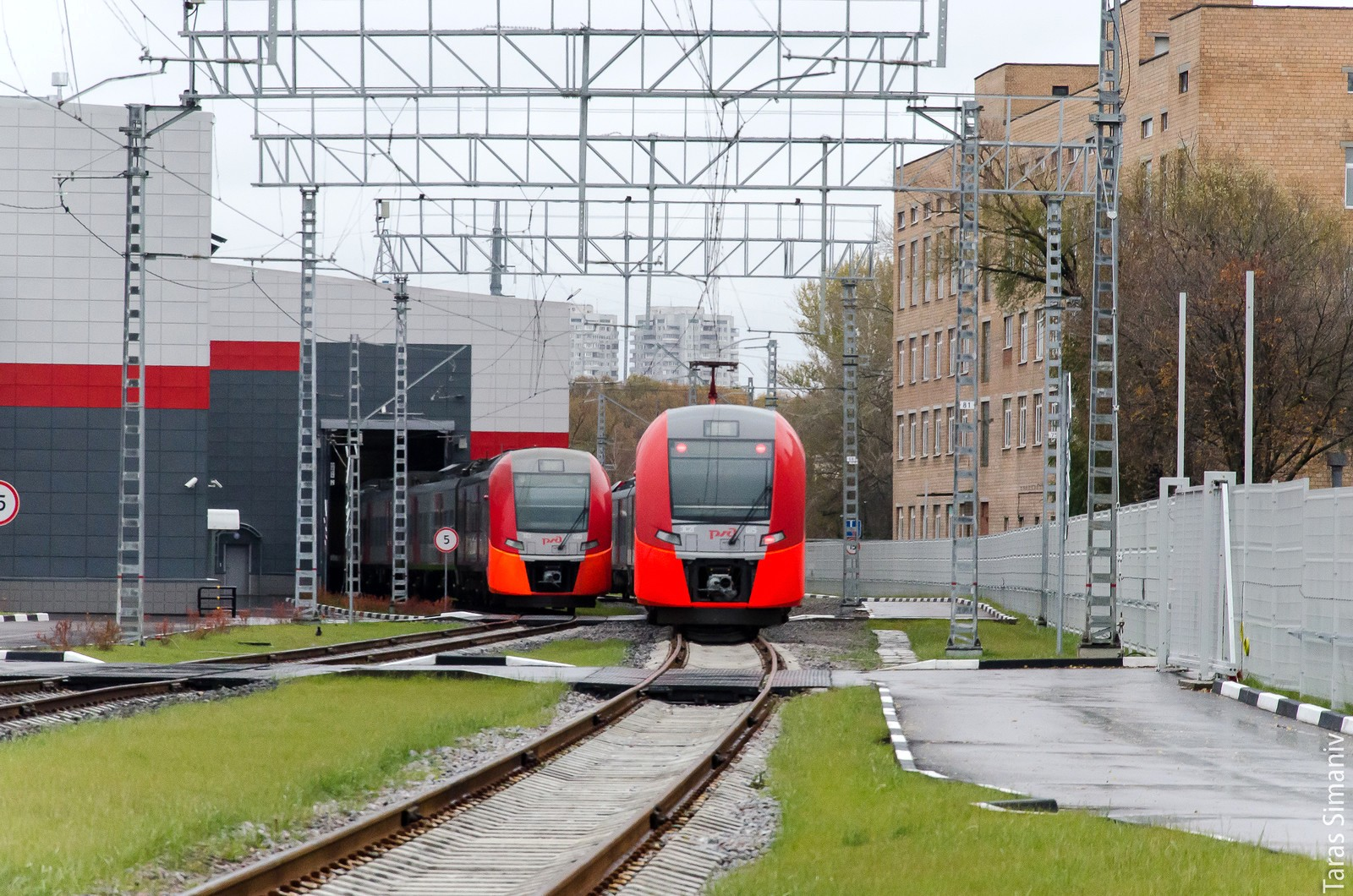 Электропоезда ЭС2Г-015 и ЭС1 в депо Подмосковная